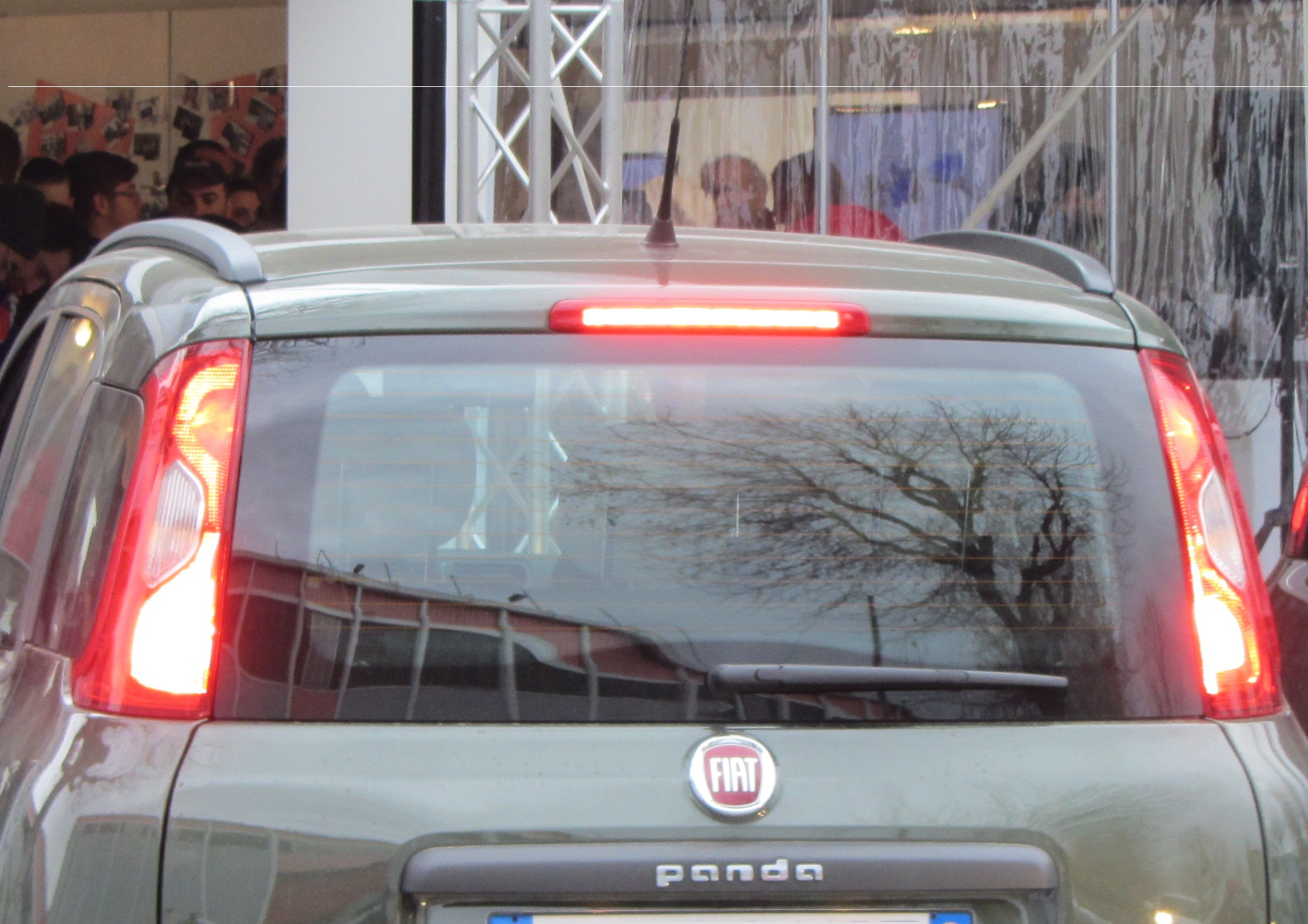 segnale di stop in una Panda 4x4